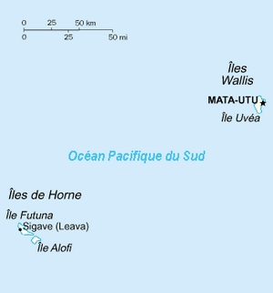 Carte du territoire d'outre mer français Wallis et Futuna